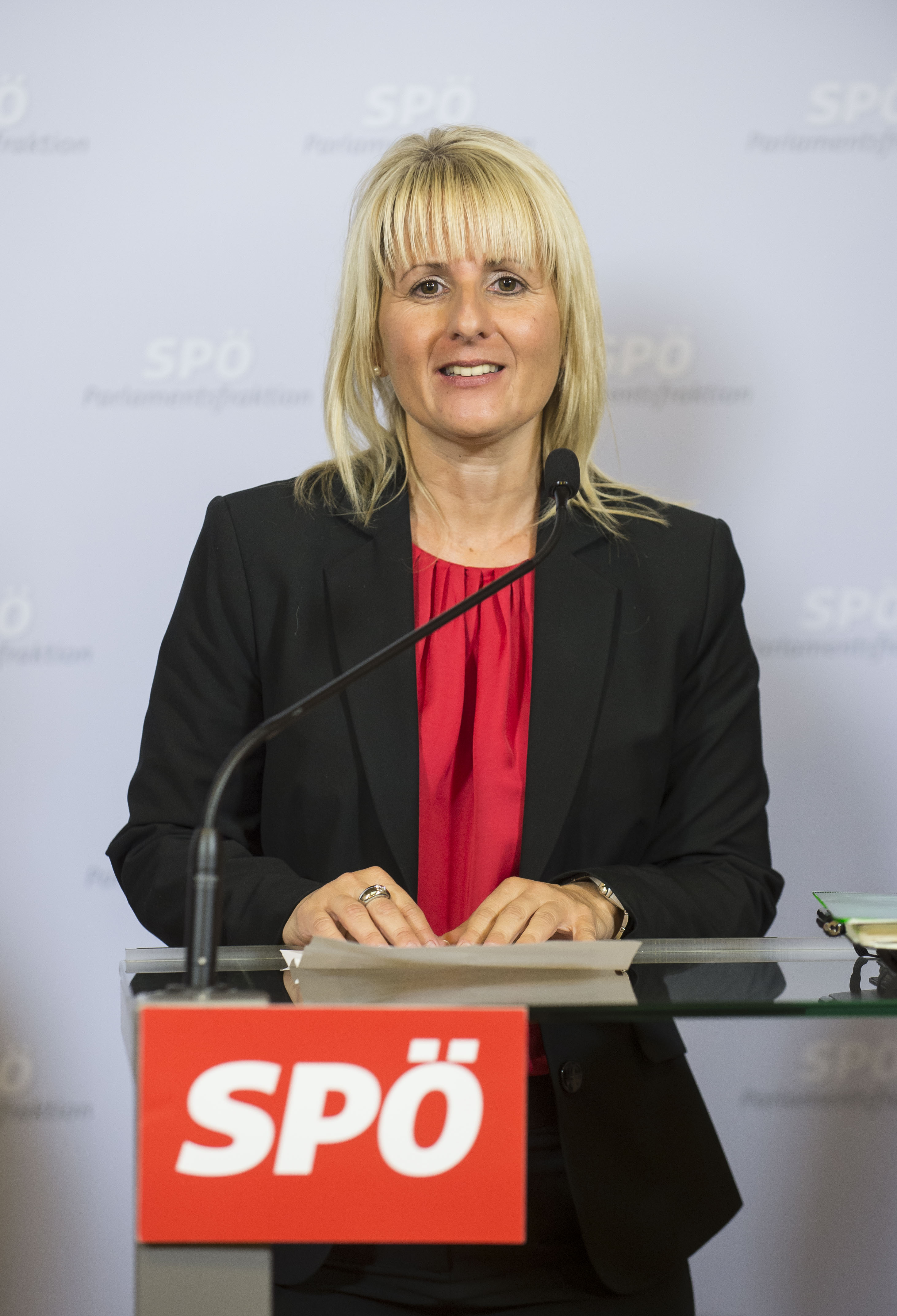 Der SPÖ-Bundesparteivorstand hat am Freitagnachmittag über personelle Änderungen sowohl in der SPÖ-Bundesgeschäftsstelle als auch in der SPÖ-EU-Delegation abgestimmt. In einer anschließenden Pressekonferenz präsentierte SPÖ-Vorsitzender, Bundeskanzler Werner Faymann die Weichenstellungen. Im Bild: Karoline Graswander-Hainz. Wien, 03.07.2015, © Thomas Jantzen / SPÖ